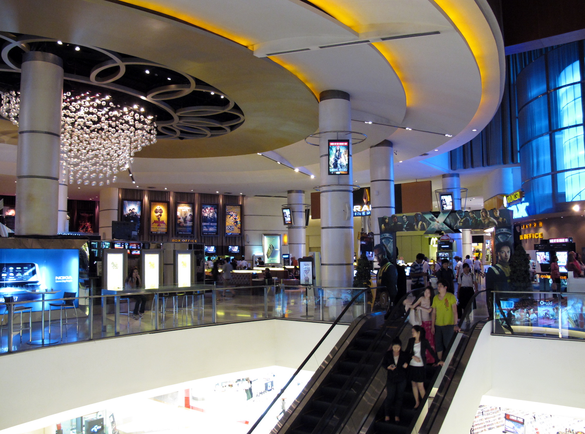 Siam Paragon Level 5 Paragon Cinema